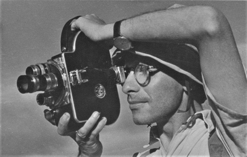 Natan Gross mit einer Handfilmkamera bei seinen ersten Dreharbeiten in Israel